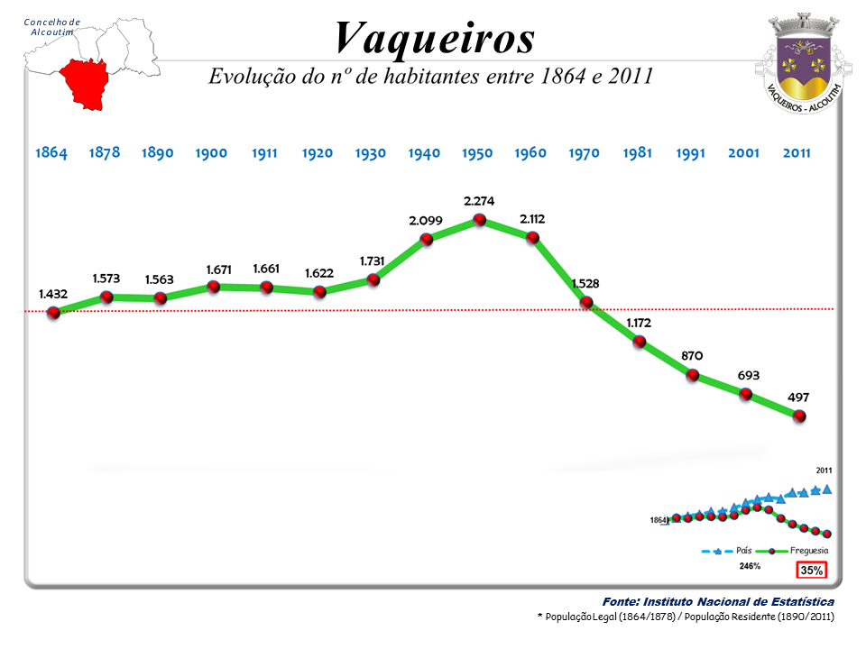 Censos 1864/2011